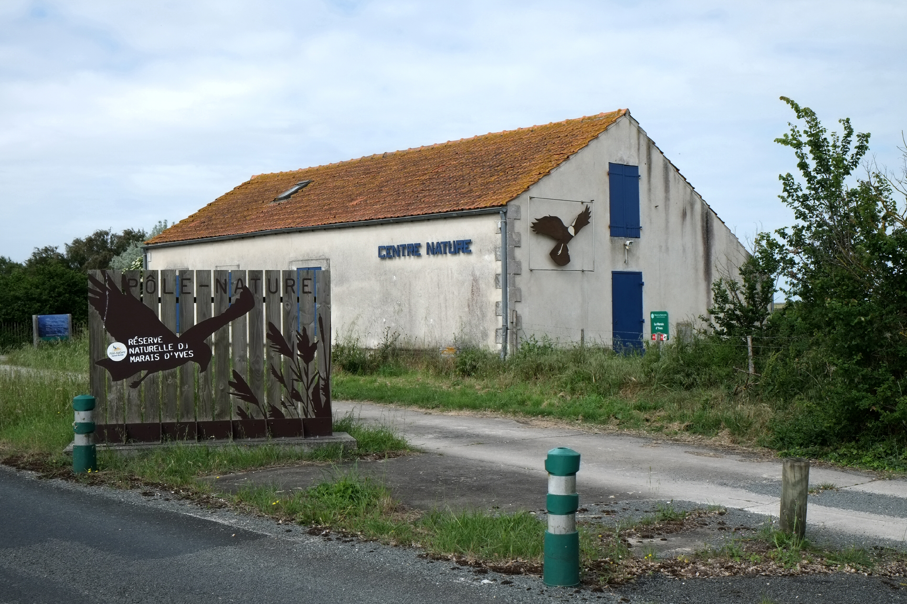 Maison d'accueil de la réserve naturelle nationale du marais d'Yves Charente-Maritime France